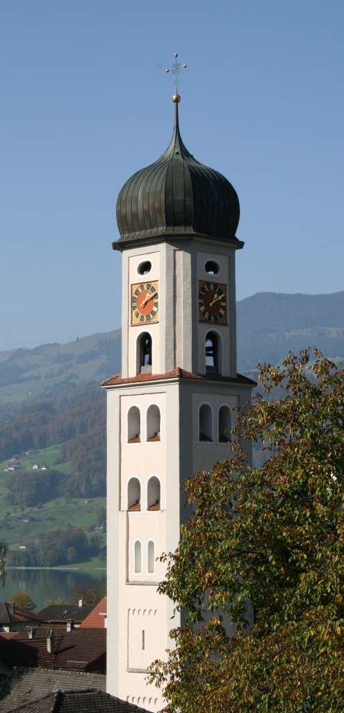 Pfarr- und Wallfahrtskirche Sachseln, Schweiz, Kirchturm